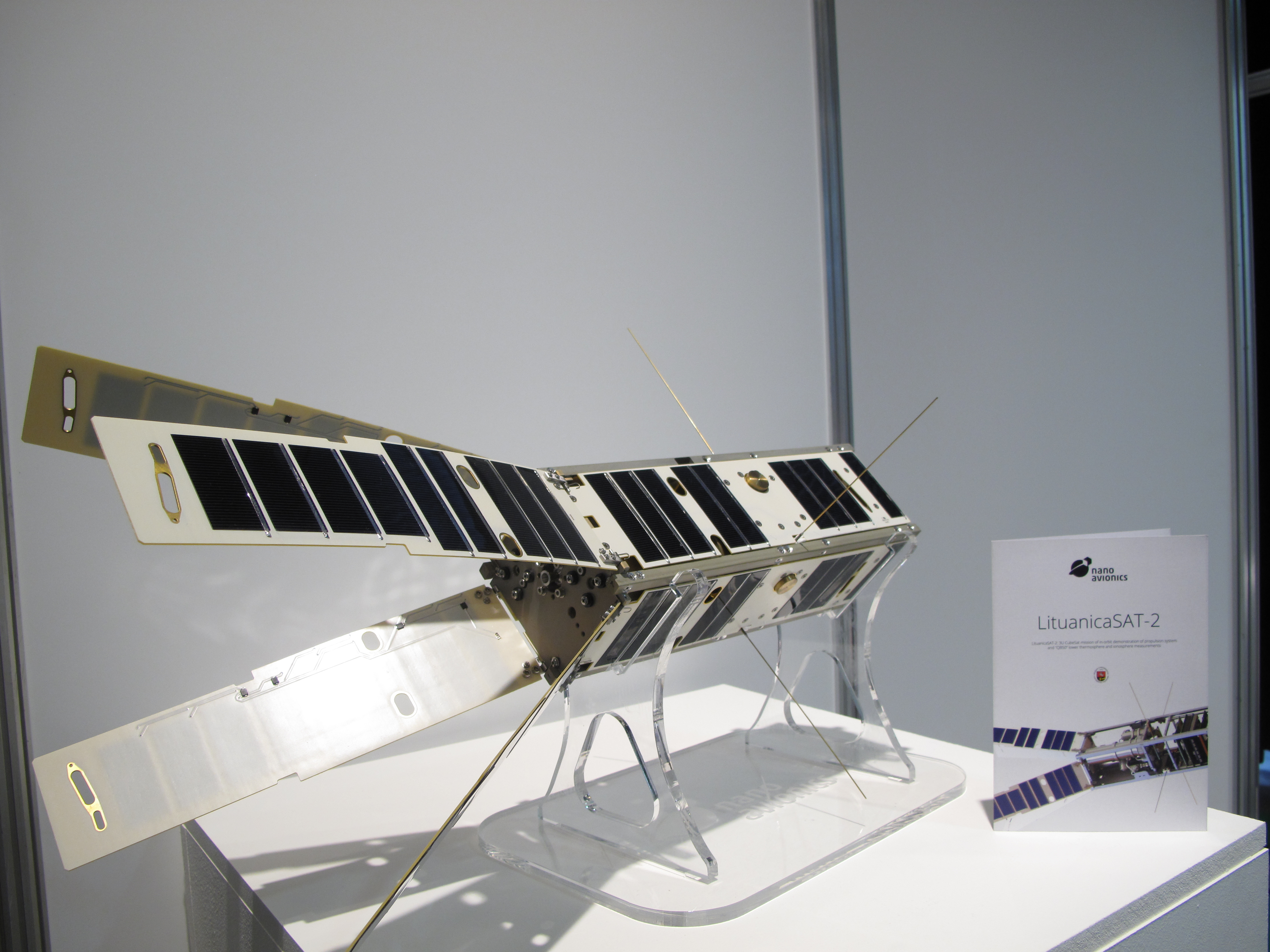 LituanicaSAT-2 palydovas.